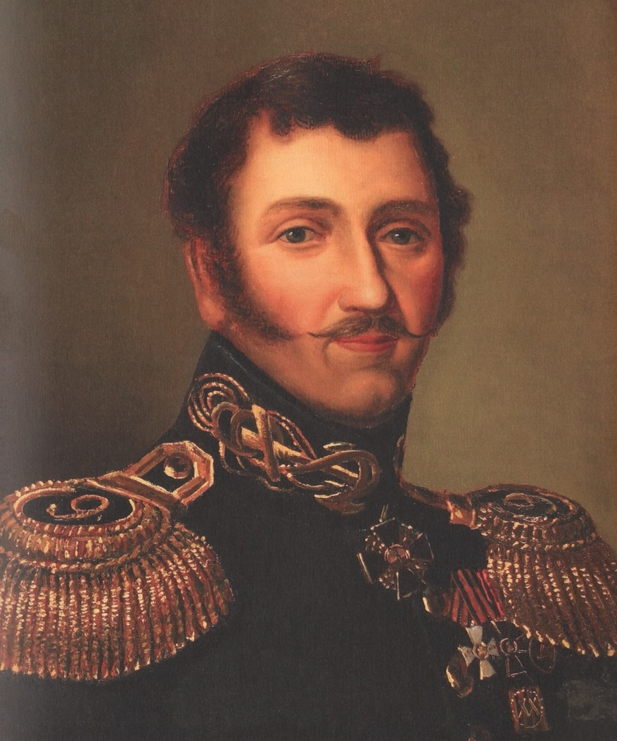 Неизвестный художник Портрет капитана 1-го ранга Леонтия Андриановича Гагемейстера 1912 г. Выполнен по заказу музея с литографии 1830-х гг. Холст, масло. 53,5х45,0 см Центральный военно-морской музей